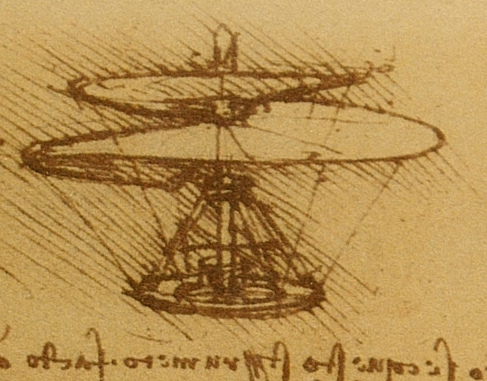 Leonardo da Vinci: Entwurf eines Helikopters